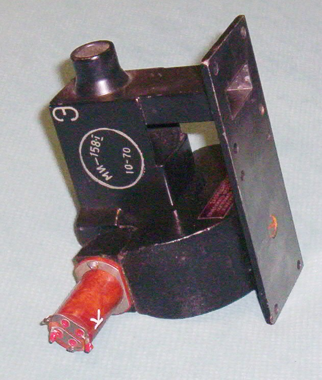 Impulsmagnetron MI-158 aus Flugzeug-Bordradar, 9,33 - 9,42GHz, 7kW, 0,1 - 1µs Impulsdauer, Sowjetunion ca. 1970